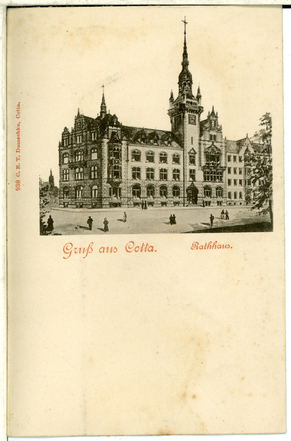 Cotta; Rathaus This postcard is from publisher Brück & Sohn in Meißen ( postcard has a unique number 00938 and is available in a higher resolution at the publisher. This images was uploaded in a cooperation project between Wikipedians and the publisher.